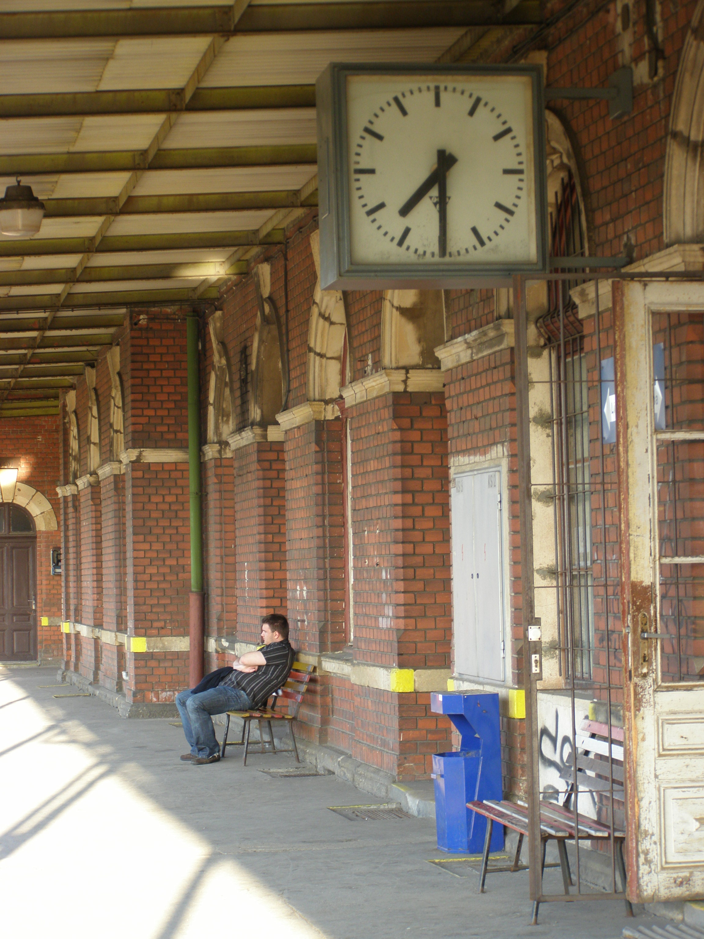 Nástupiště nádraží Liberec-Horní Růžodol na trati do České Lípy.